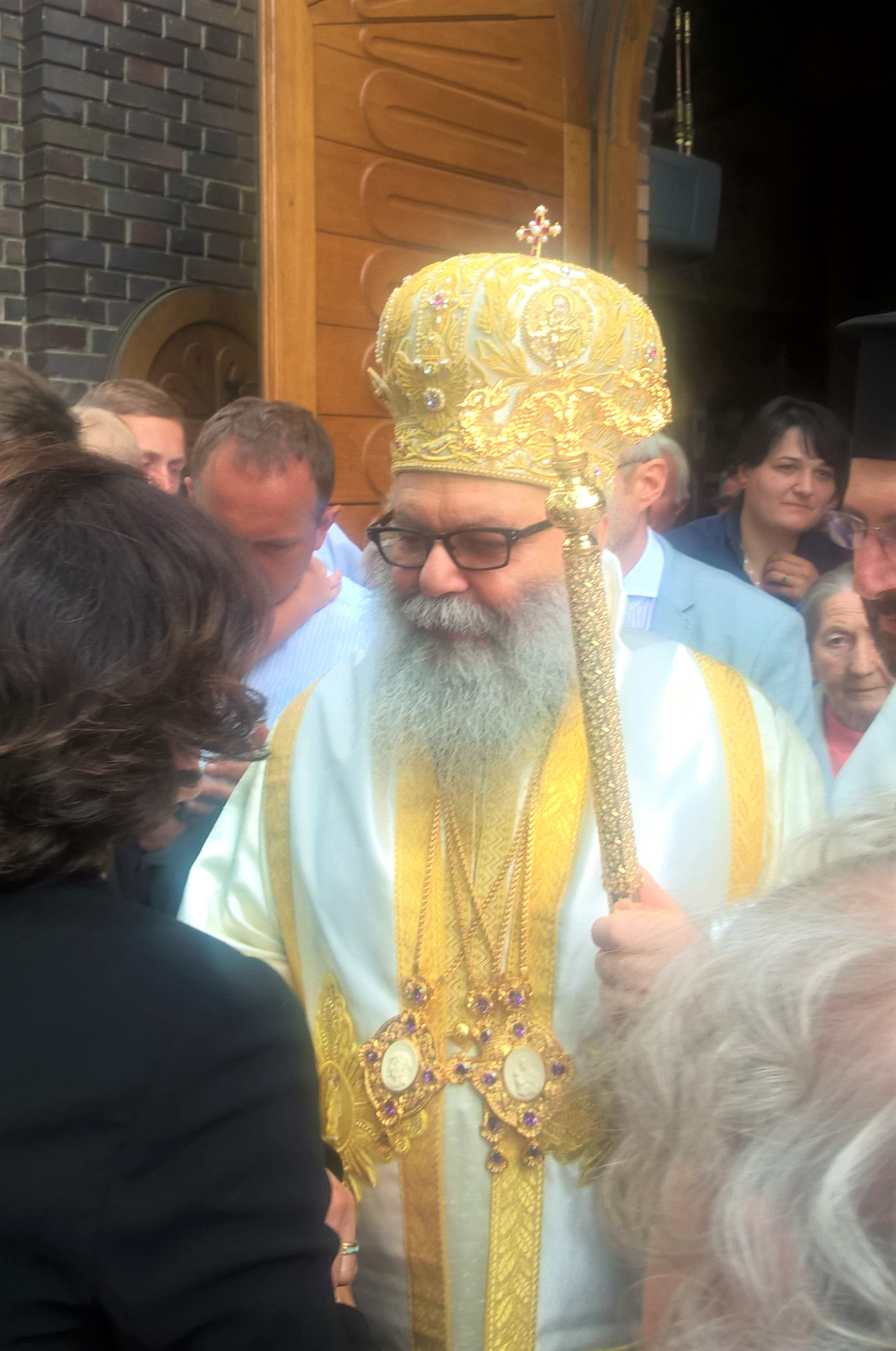 Patriarcha Antiochii Jan X w cerkwi Św. Ducha w Białymstoku